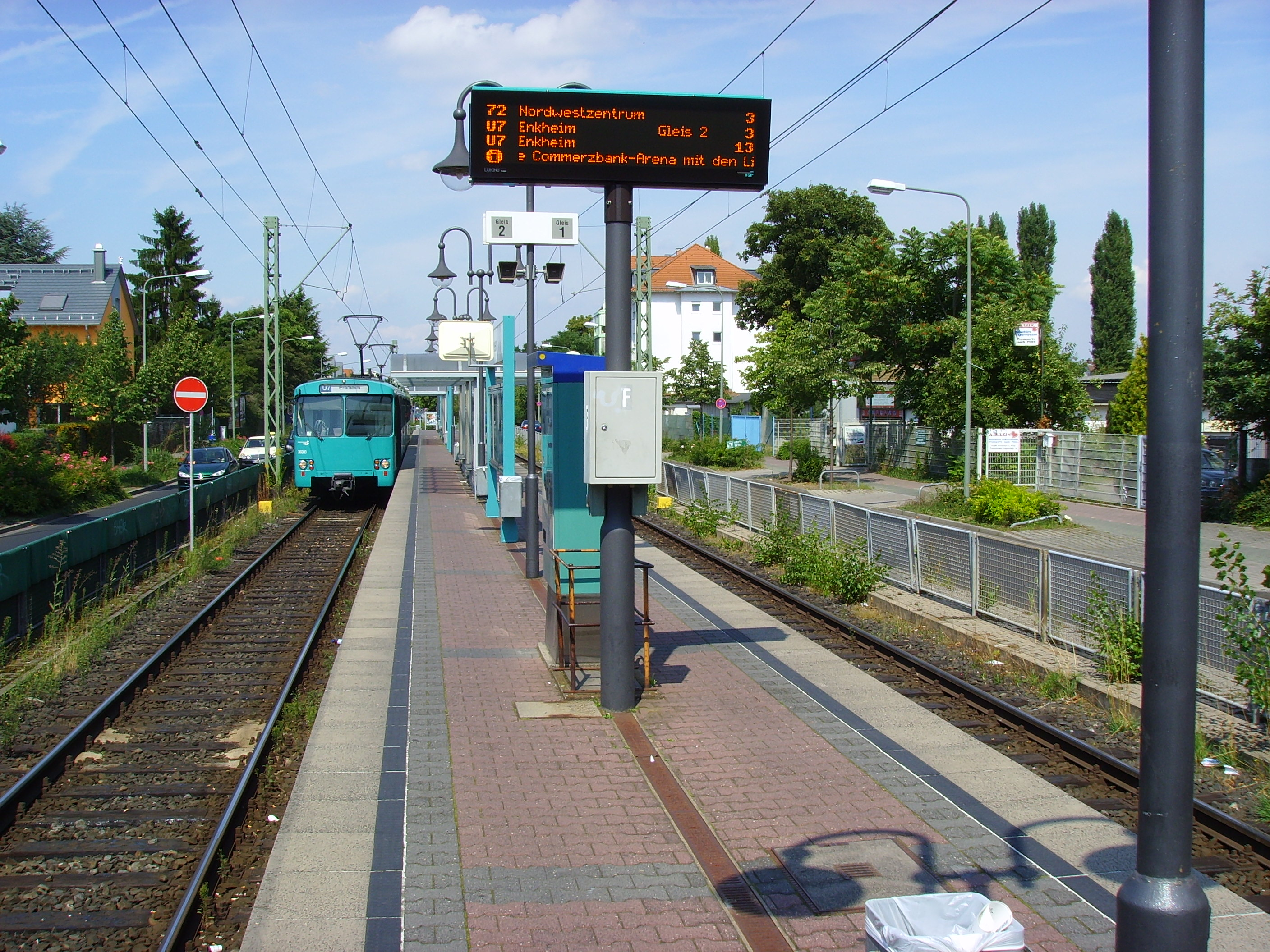 Frankfurt am Main-Hausen, U-Bahnhof Hausen